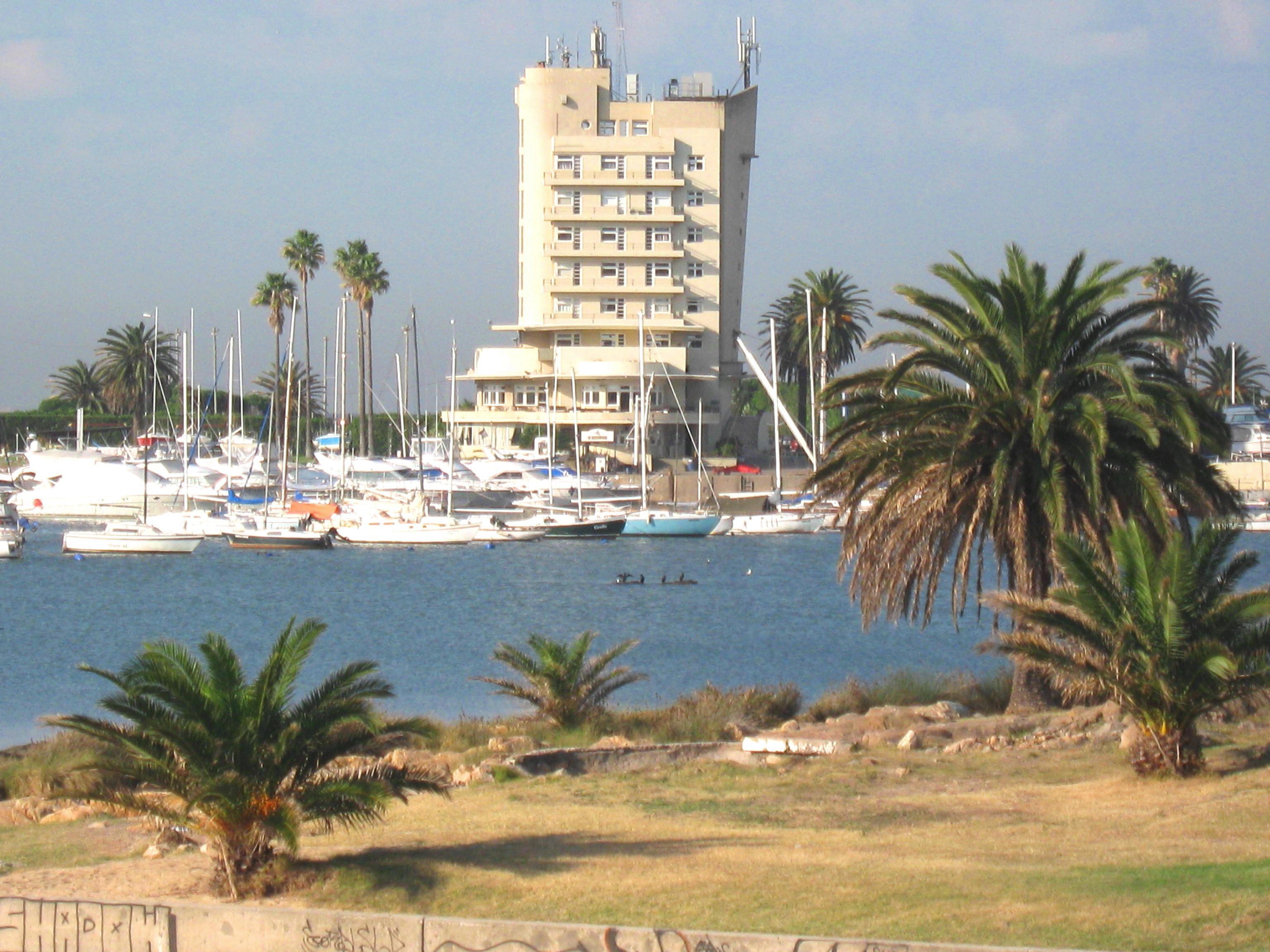 Yacht Club. Ubicada en el departamento de Montevideo. Puerto del Buceo.